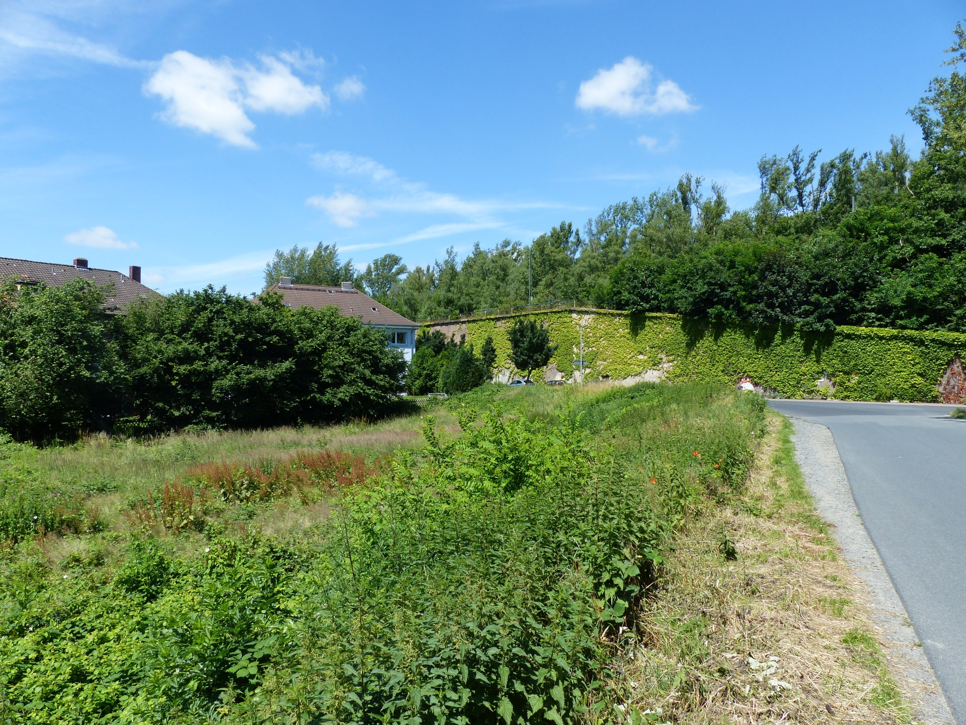 Gelände des früheren Lämmchenteichs im Braunschweiger Stadtquartier Bebelhof entlang der Schwatzkopffstraße, Blickrichtung Borsigstraße (Norden).